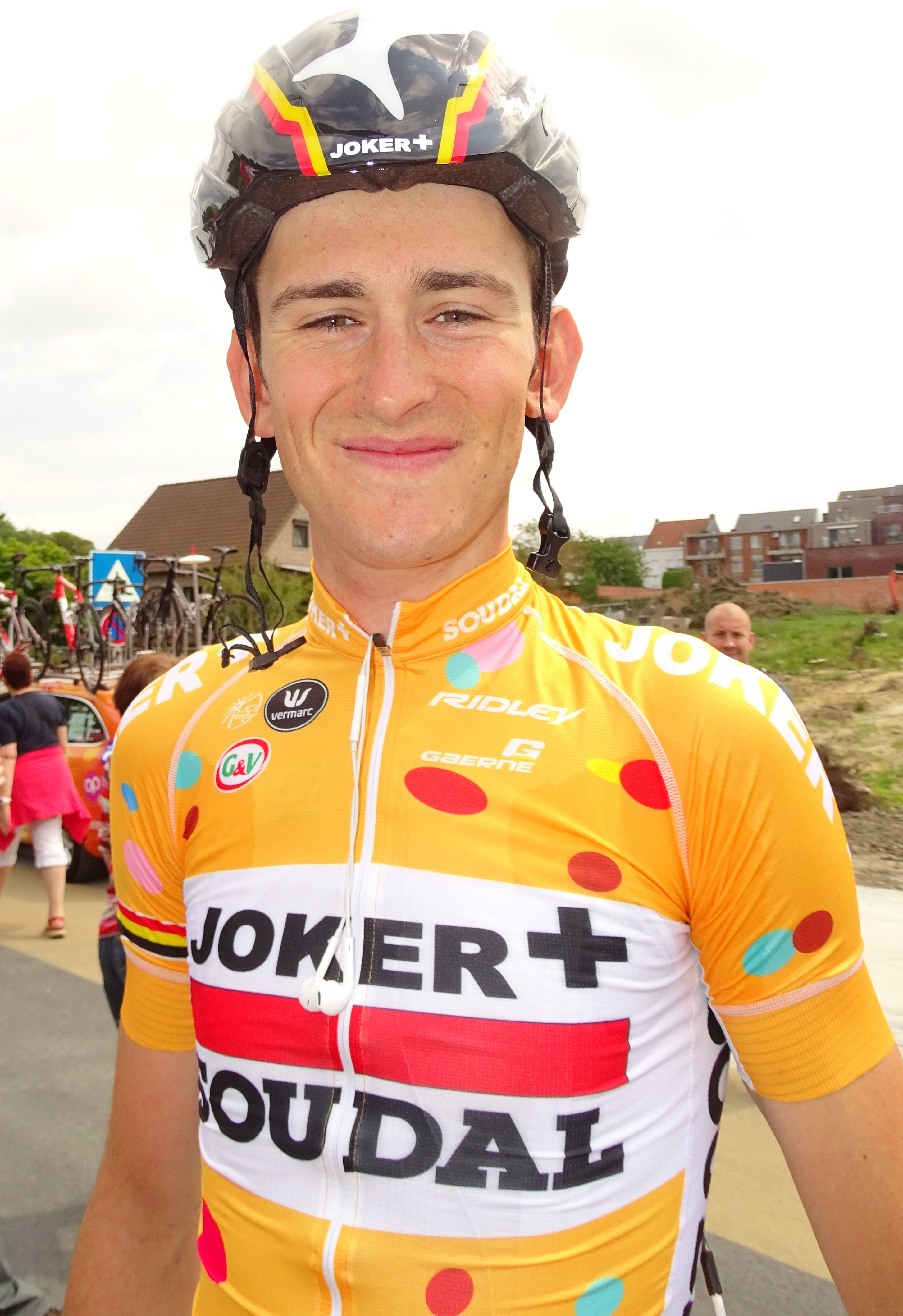 Reportage réalisé le mercredi 27 mai à l'occasion du prologue du Tour de Belgique 2015 à Bornem, Belgique.